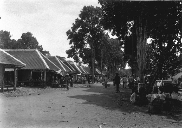 Foto. De passar te Djember op Oost-Java